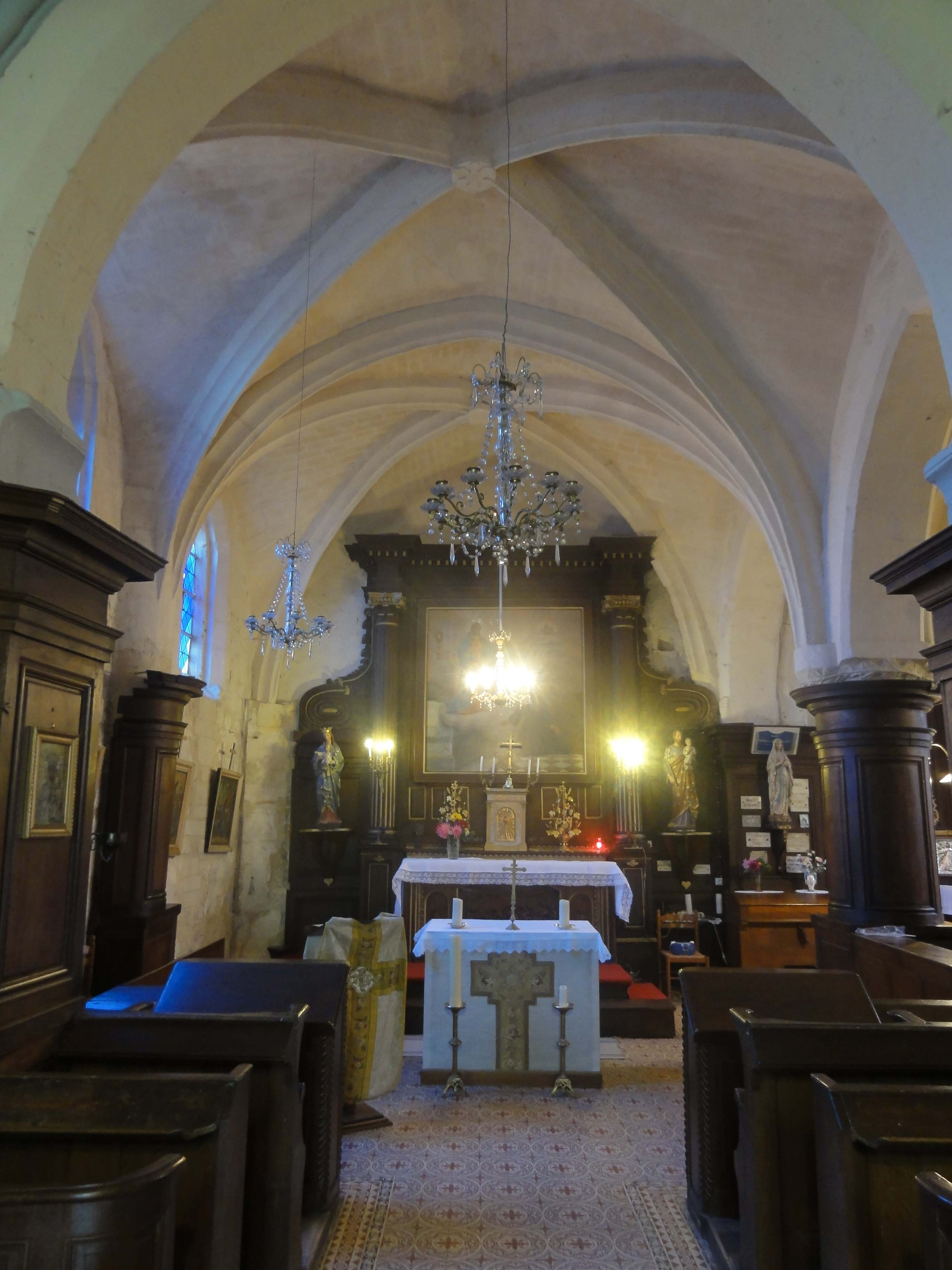 Chœur, vue vers l'est.